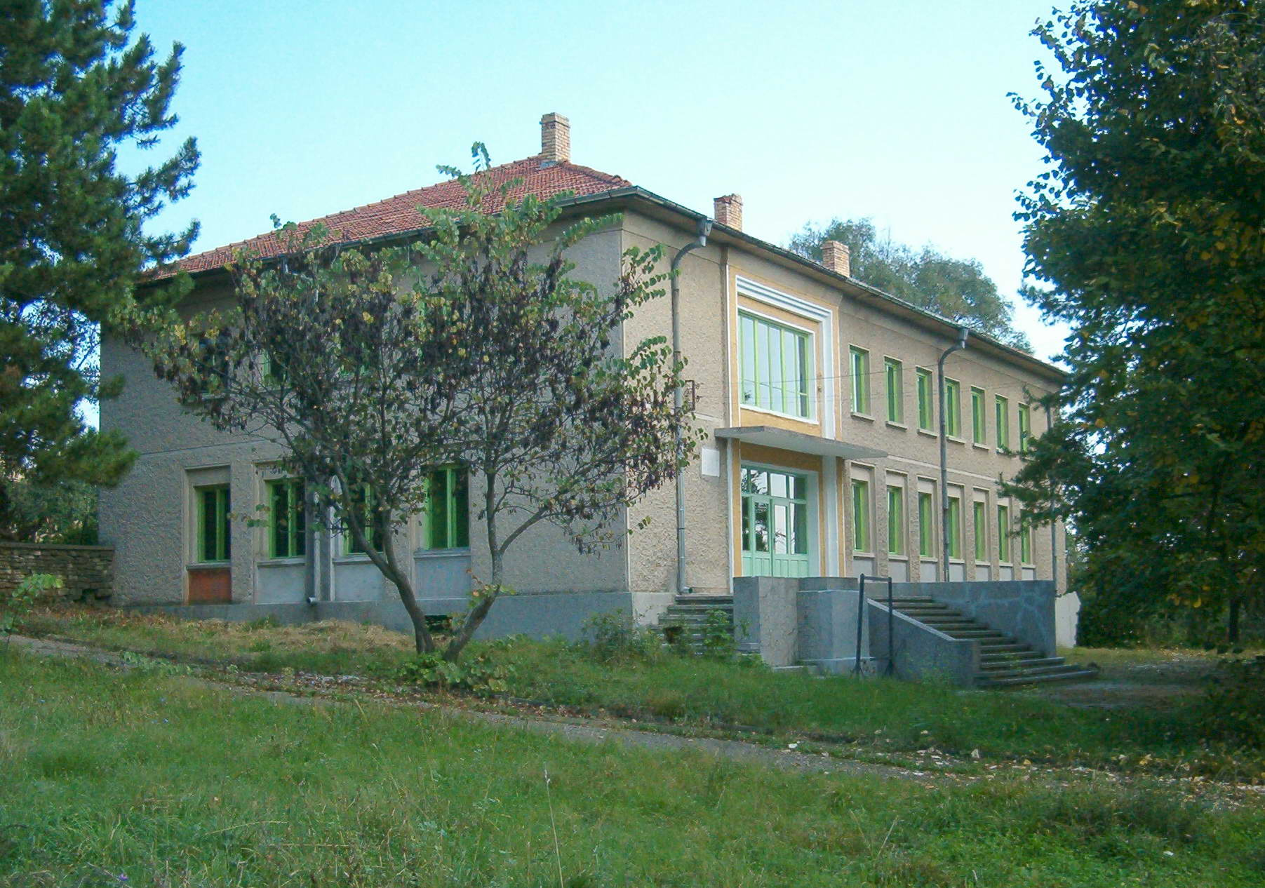 Сградата на читалището в село Конак, Поповско - 2006 год.